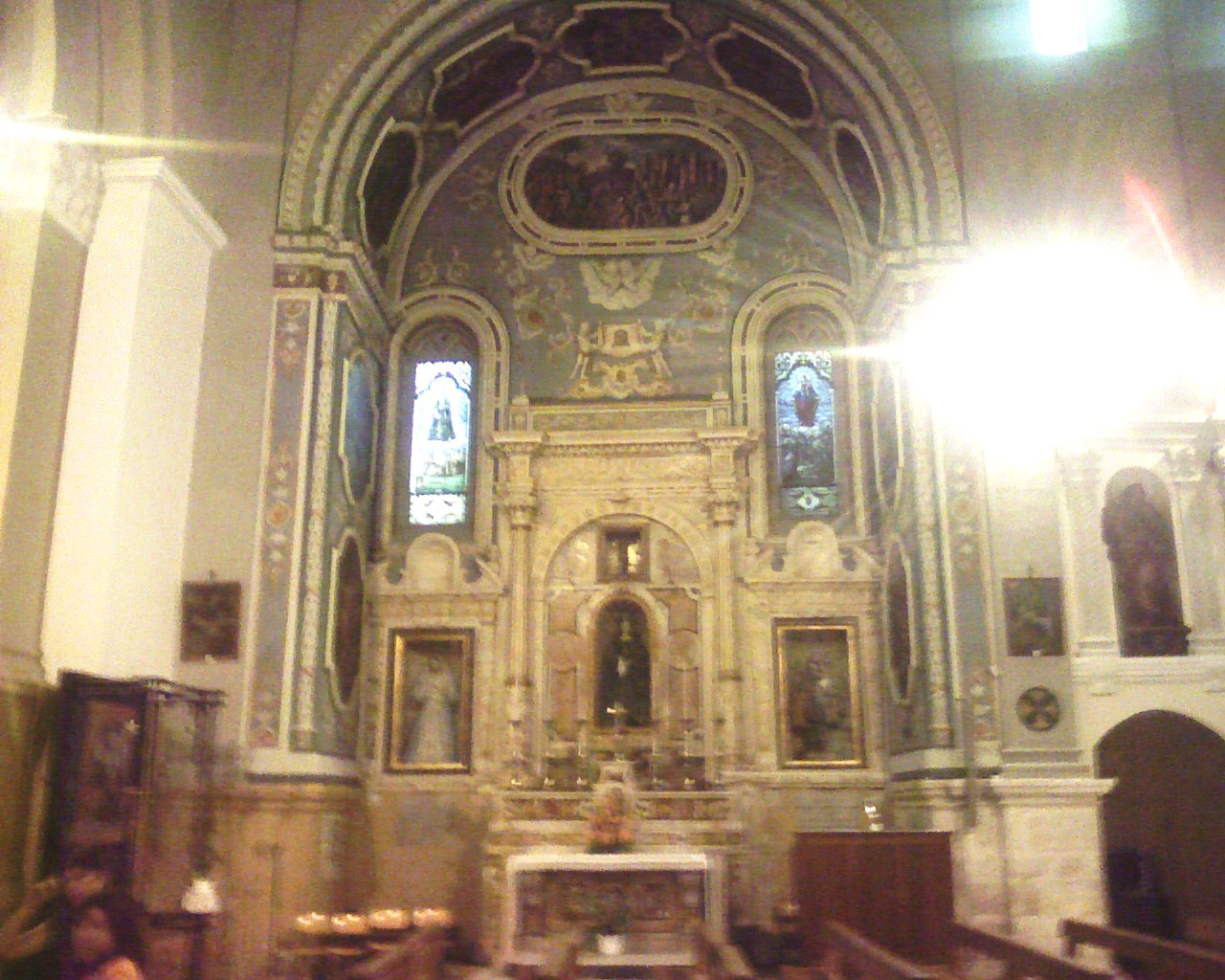 Chiesa Maria Santissima Annunziata - Modugno (Bari) - Italy